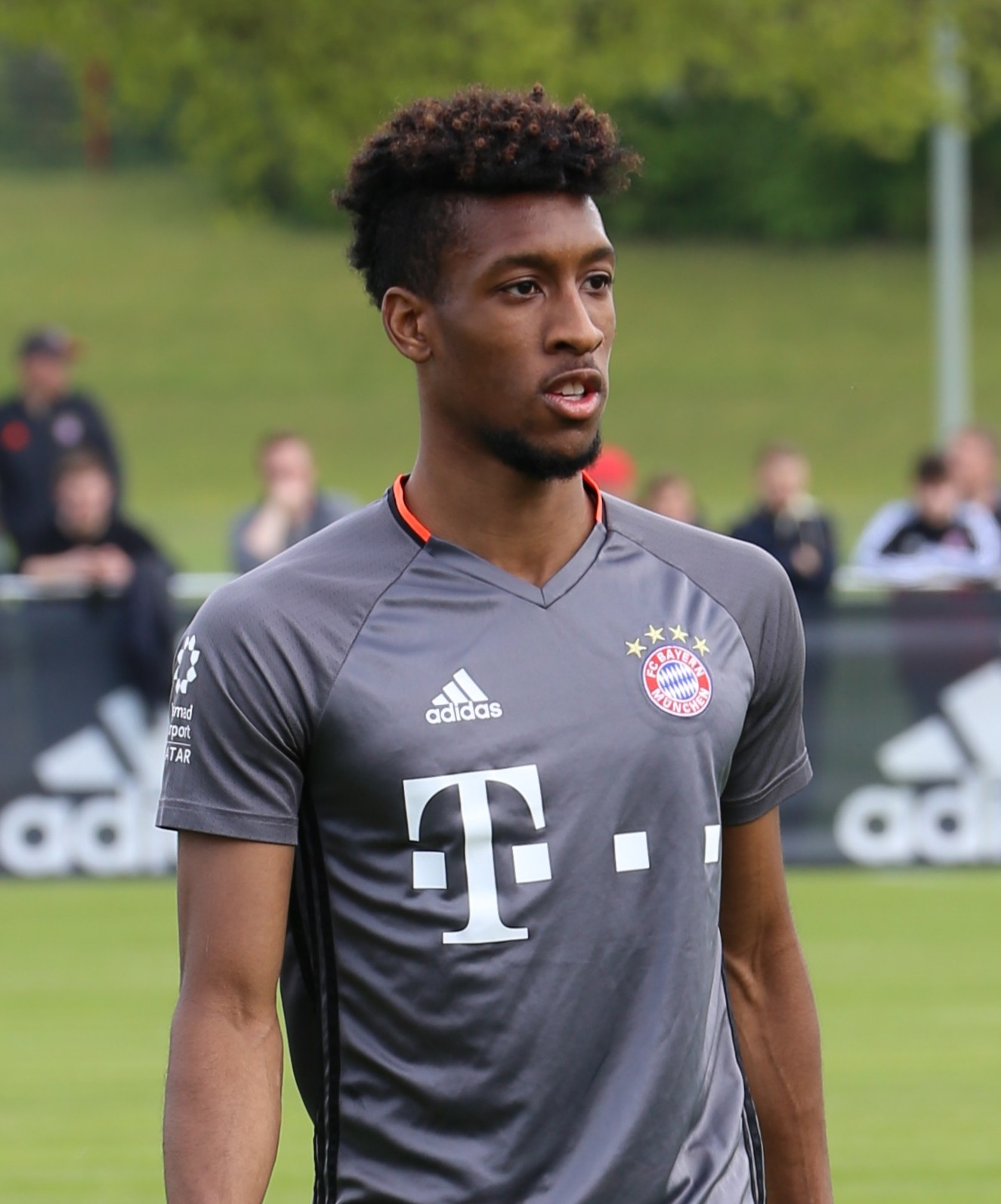 Kingsley Coman, am 3. Mai 2017 beim Training auf dem Gelände des FC Bayern München